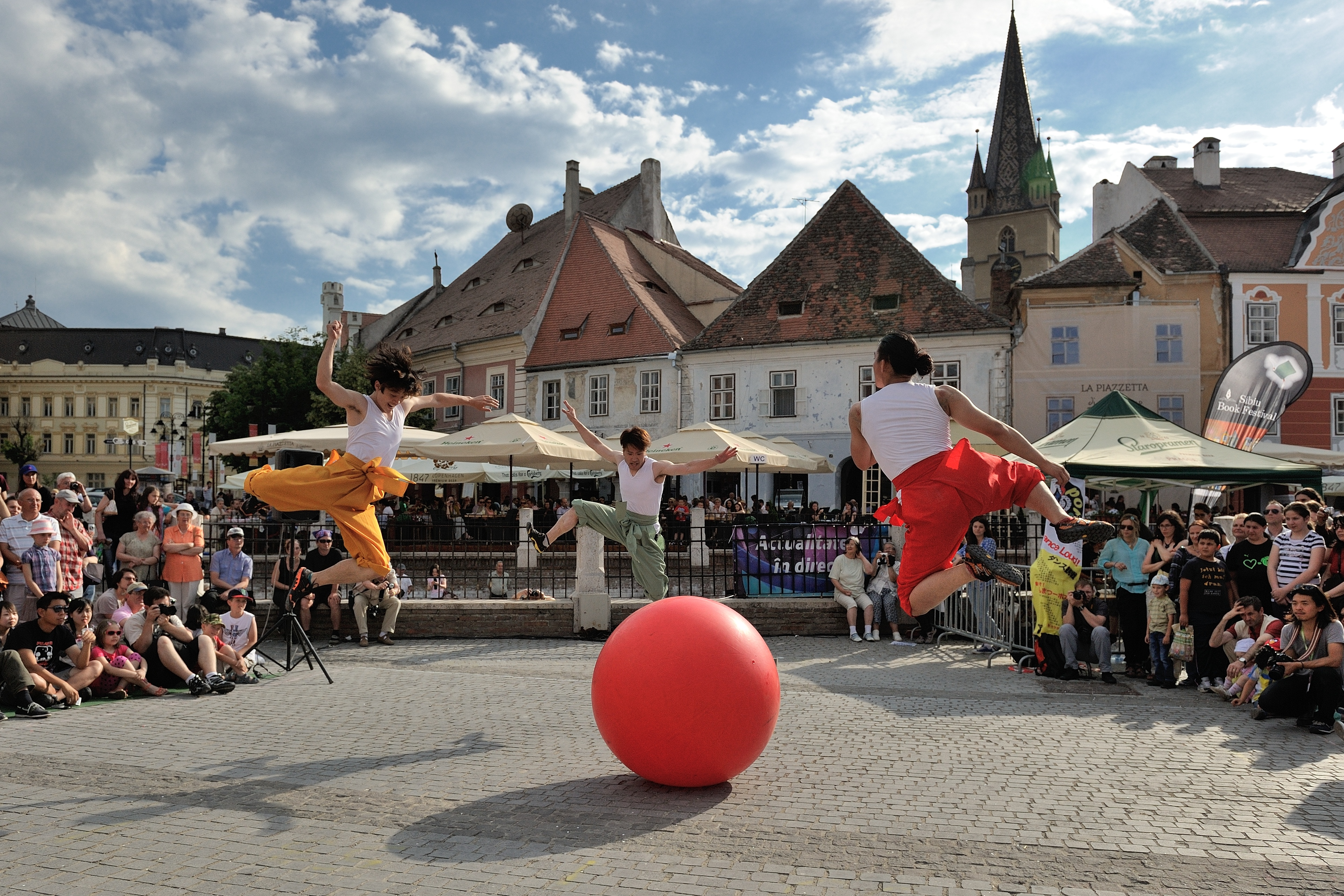 Sibiu International theater Festival 2014